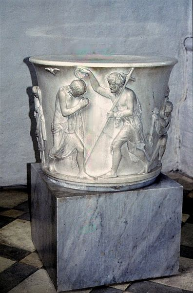 Faaborg Kirke i Danmark. Døbefont af H.E.Freund